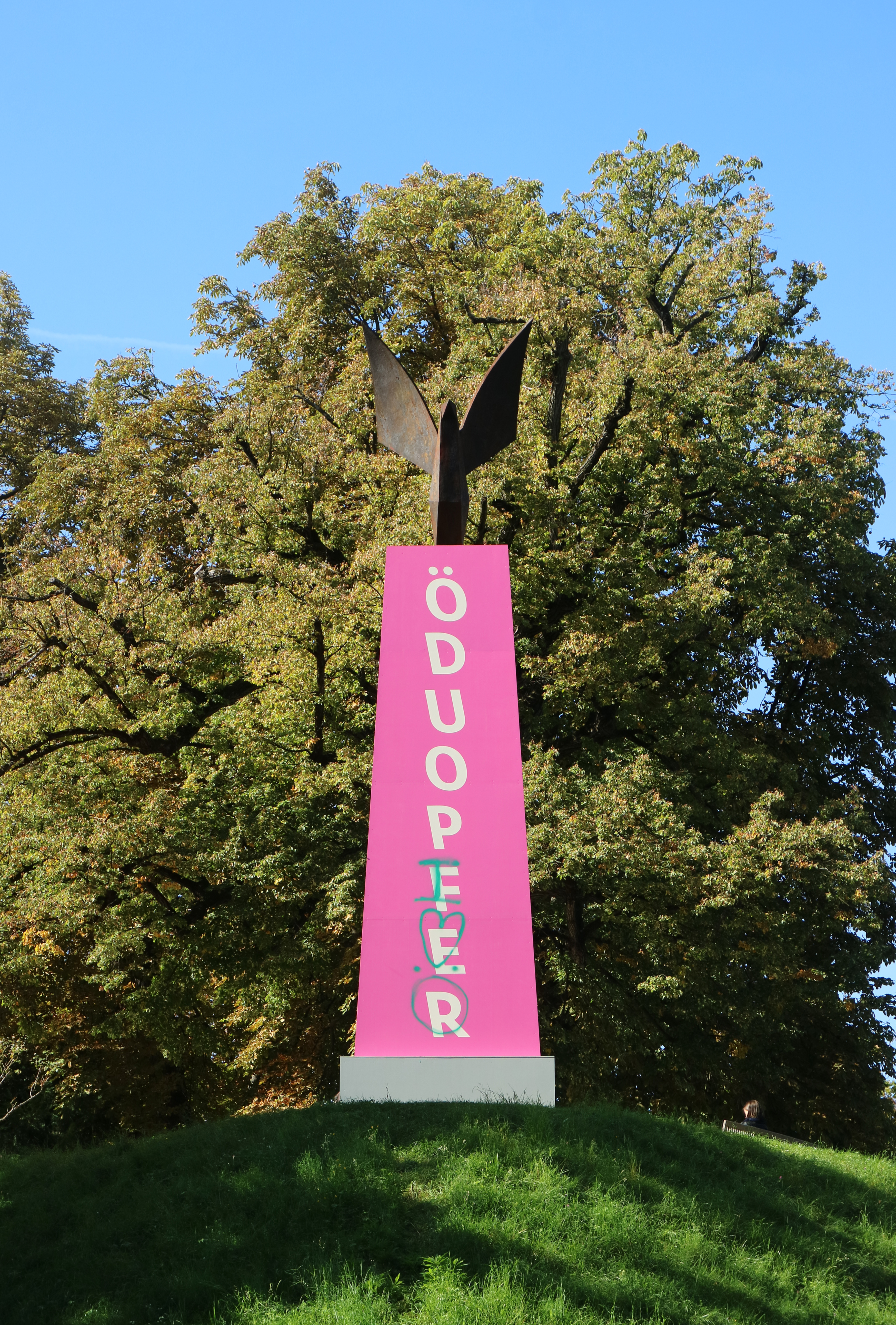 Eduard Freudmann: Monumyth (2019), Kunstinstallation am Grazer Freiheitsdenkmal (Adler-Befreiungsdenkmal) anlässlich des steirischen herbst 2019, die sich kritisch mit dem Opfermythos Österreichs auseinandersetzt